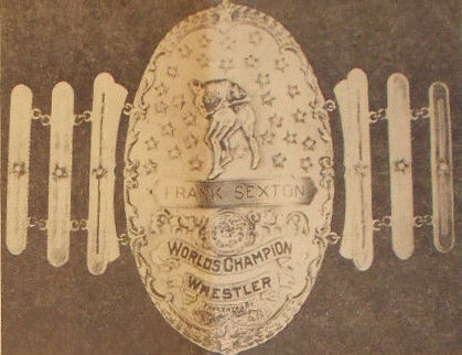 Jim "Goon" Henry en page 4 du magazine de catch The Wrestling News du 16 janvier 1947